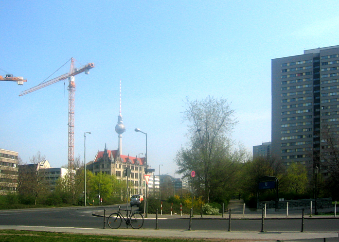 Berlin-Mitte, Spittelmarkt